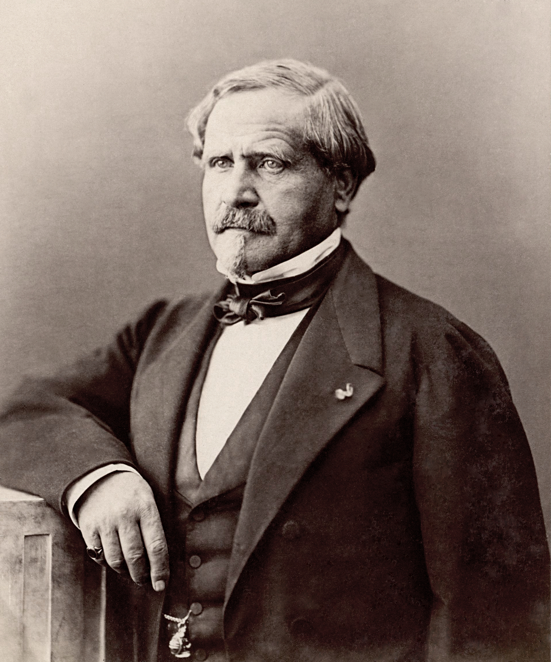 Pierre Justin Ouvrié (1806 - 1879), peintre français